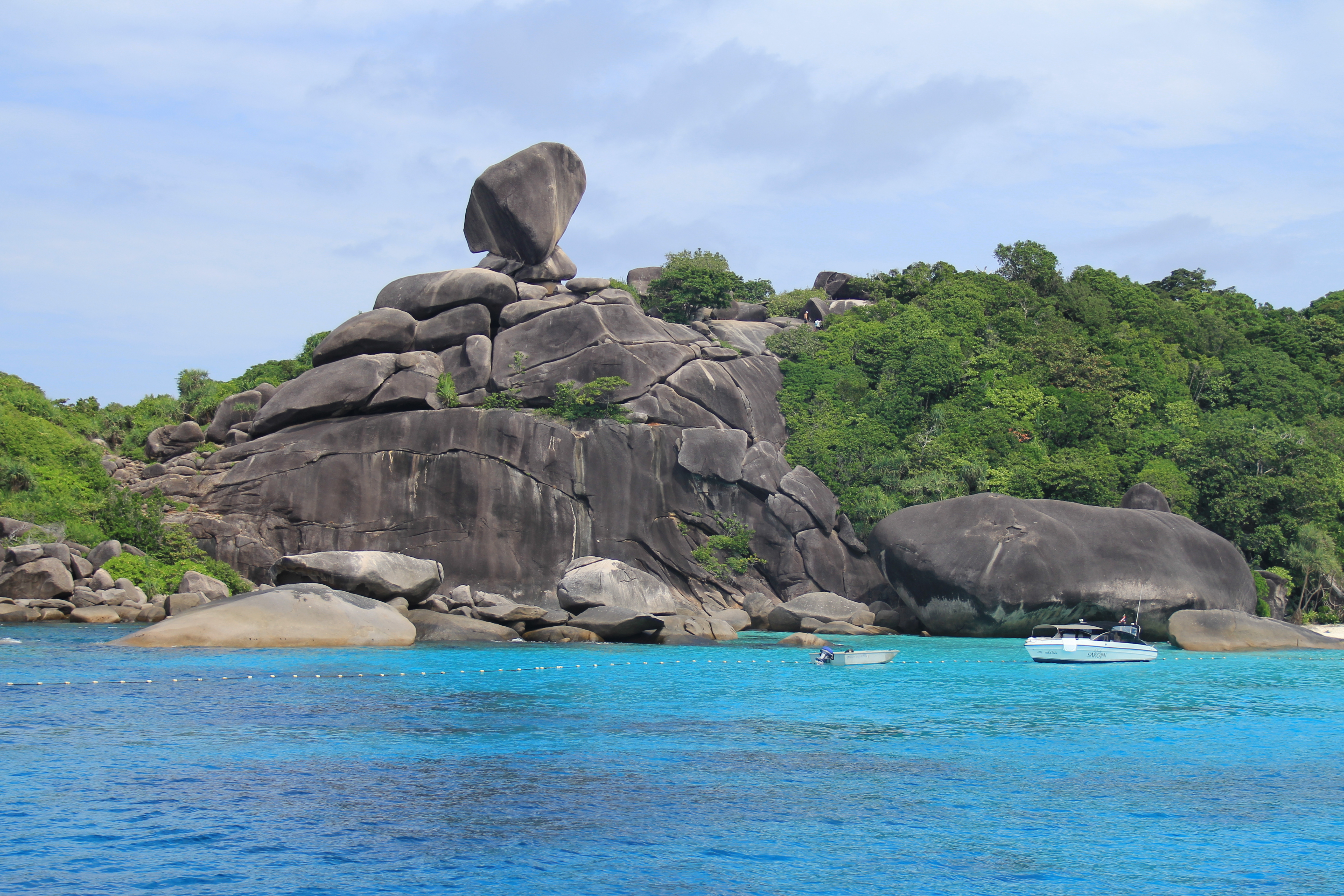 Rock at Ko Similan Island